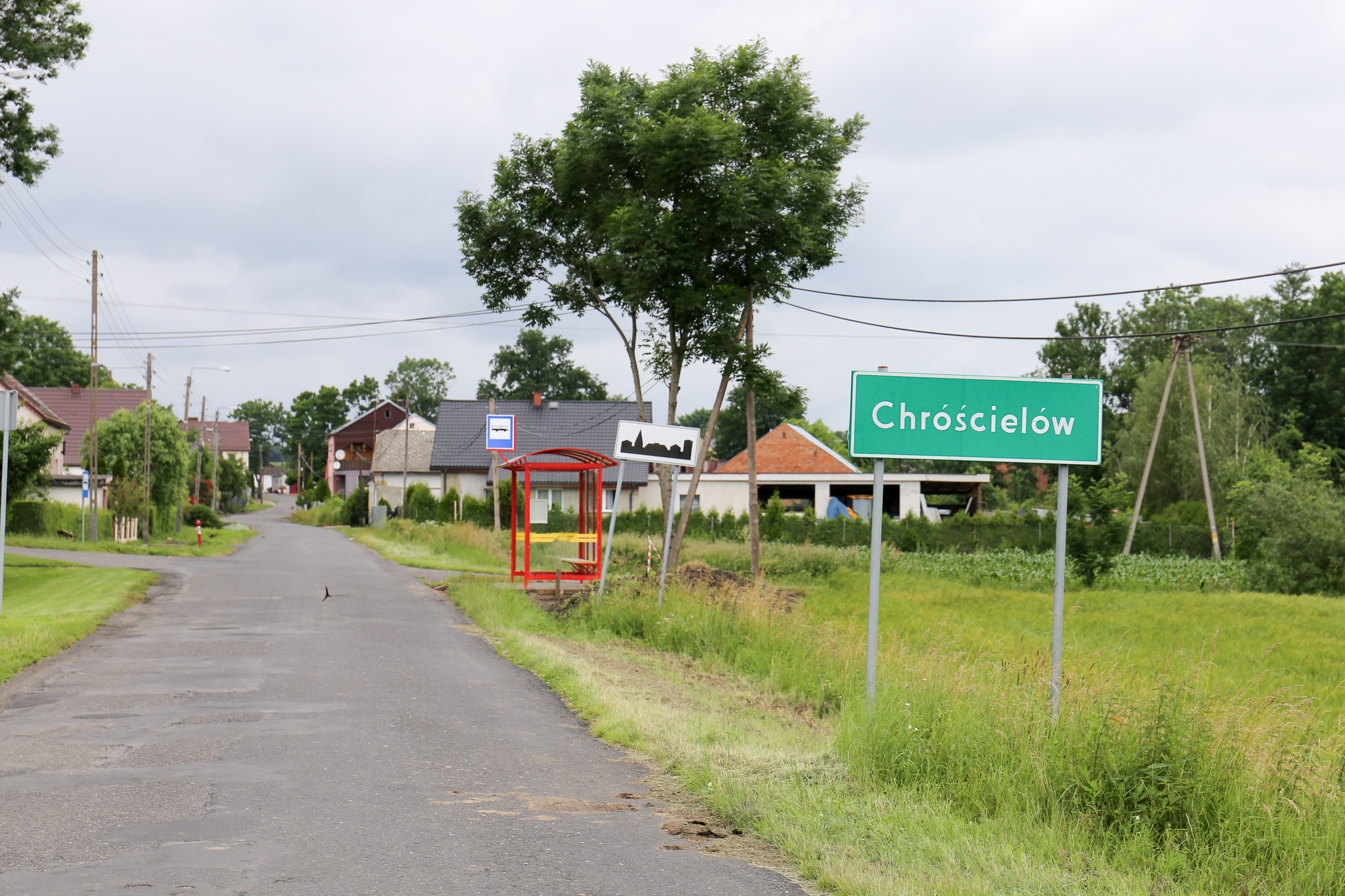 Chróścielów - wieś w Polsce położona w województwie opolskim, w powiecie głubczyckim, w gminie Kietrz.